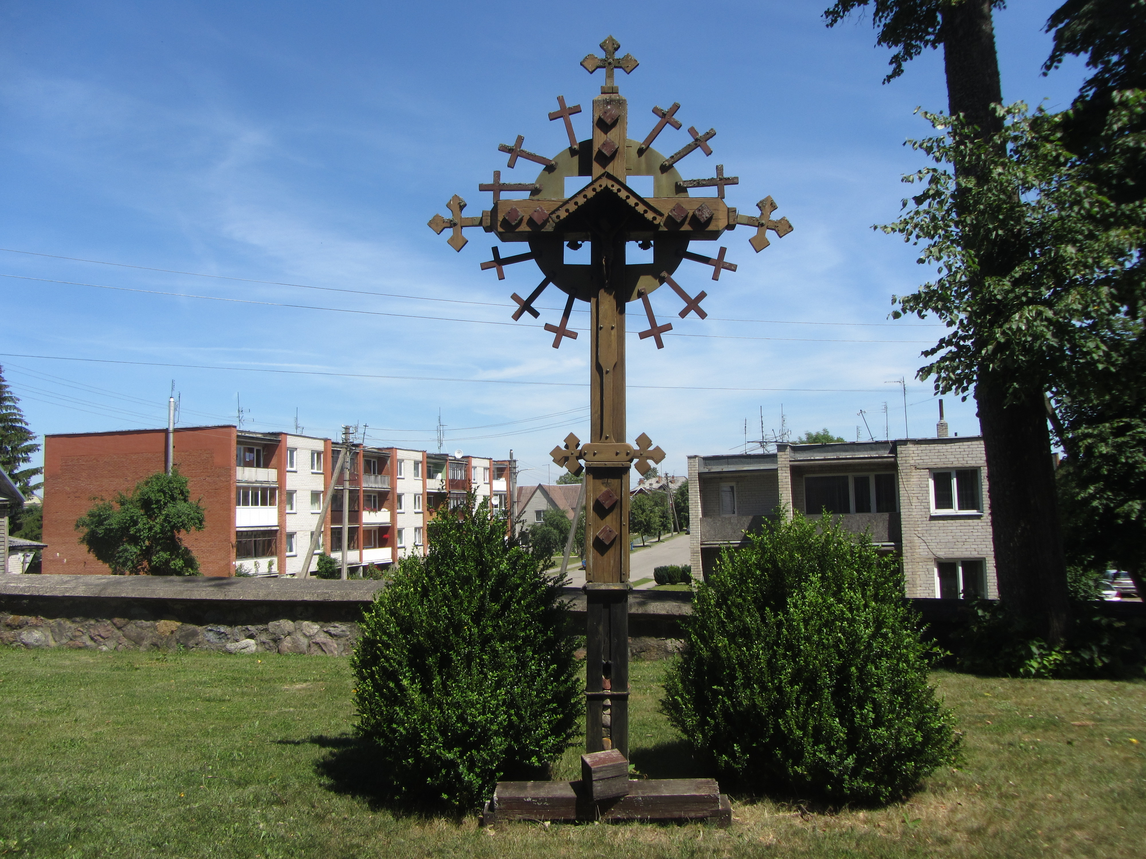 Daugai, Lithuania